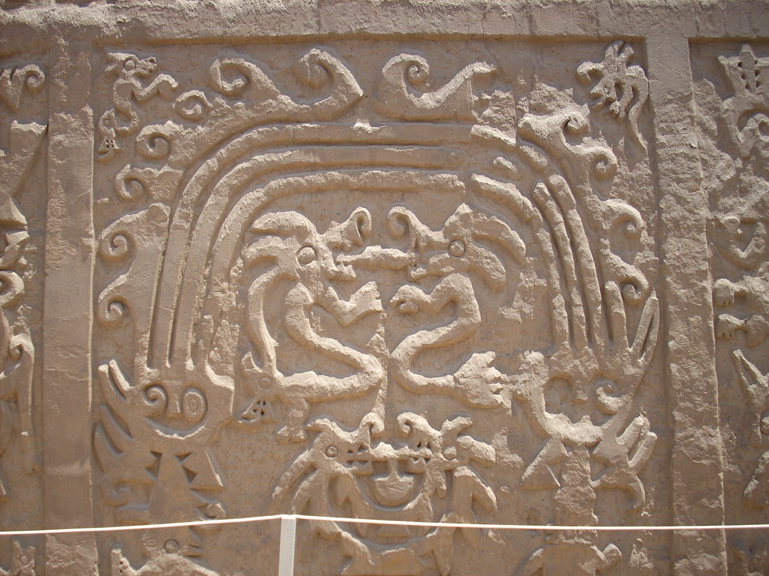 Uno de los muros internos de la Hauca del Dragón, en la ciudad de Trujillo con su grabado más característico.